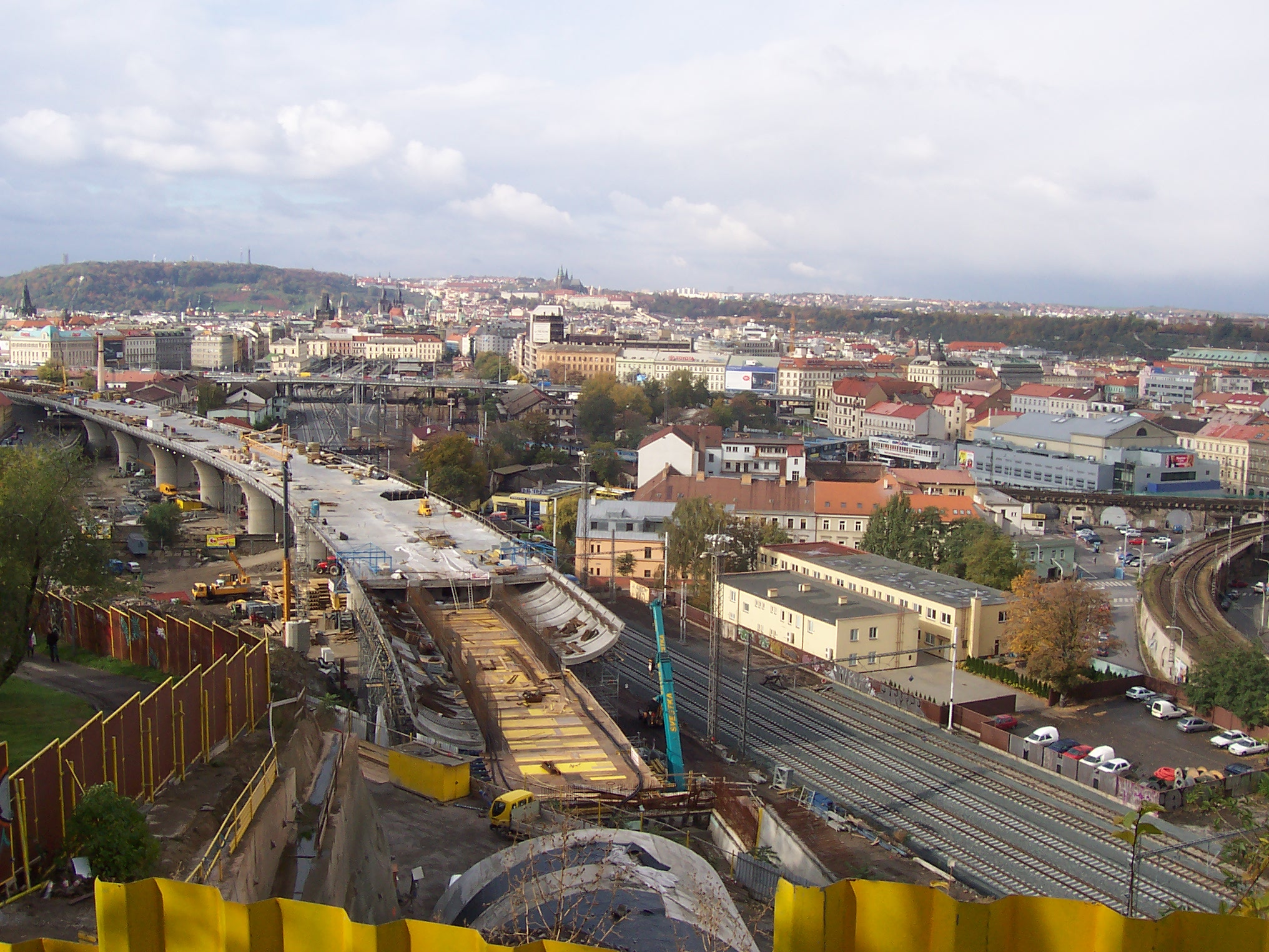 Stavba železniční estakády projektu Nové spojení z Hlavního nádraží do tunelu pod Vítkovem. Pohled z východního svahu Vítkova. Railway scaffold bridge being built for the New connection project.